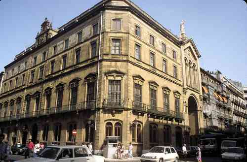 Bihotz sakratuaren eliza, Andia 3, Donostia.